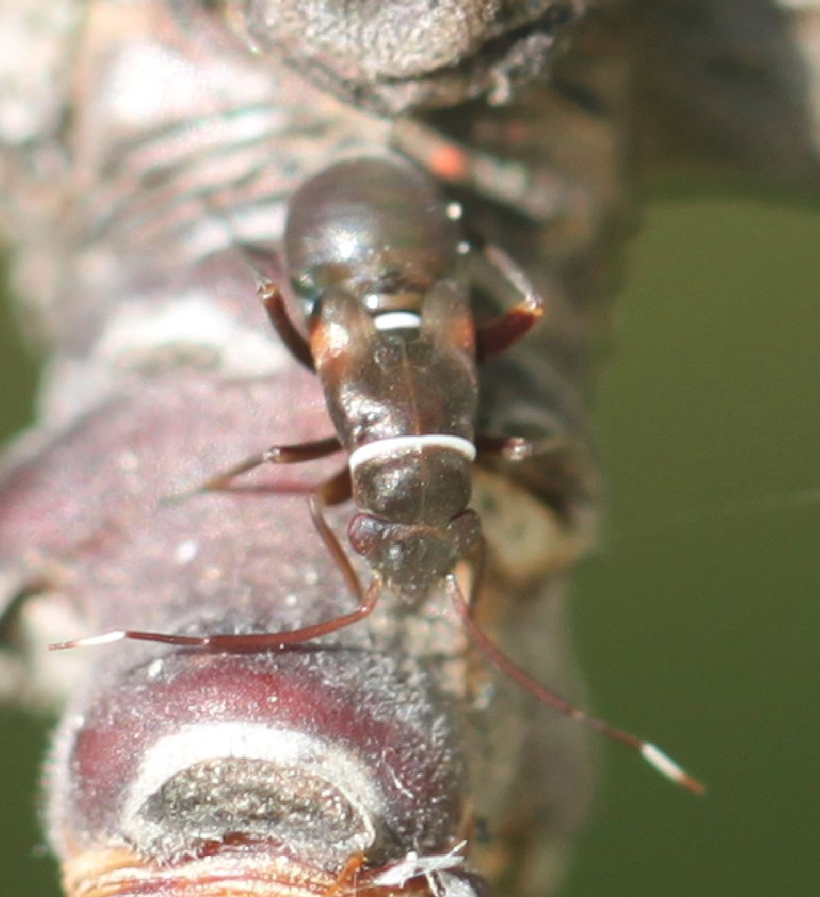 Nymphe von Pilophorus perplexus an einem Pflaumenbaum, am 14. Mai 2020 nahe Heidelberg